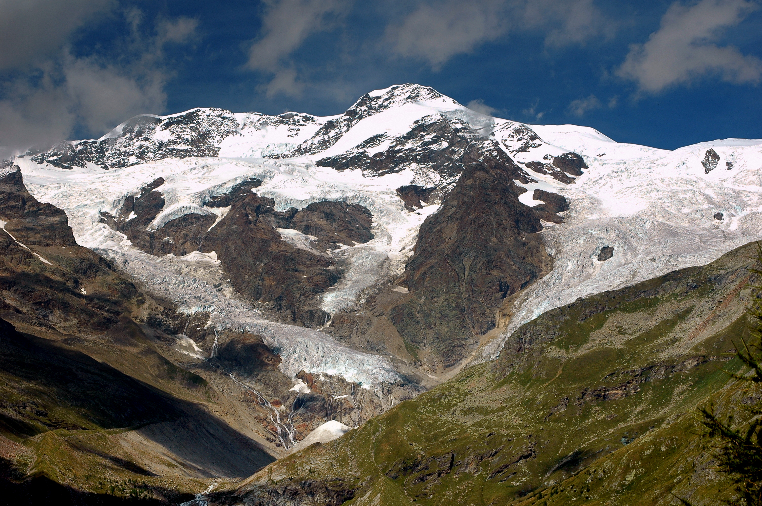 Monte Rosa da Gressoney la Trinitè con il Lyskamm Occidentale m.4481 a destra, e il Lyskammo Orientlae m.4527 a destra